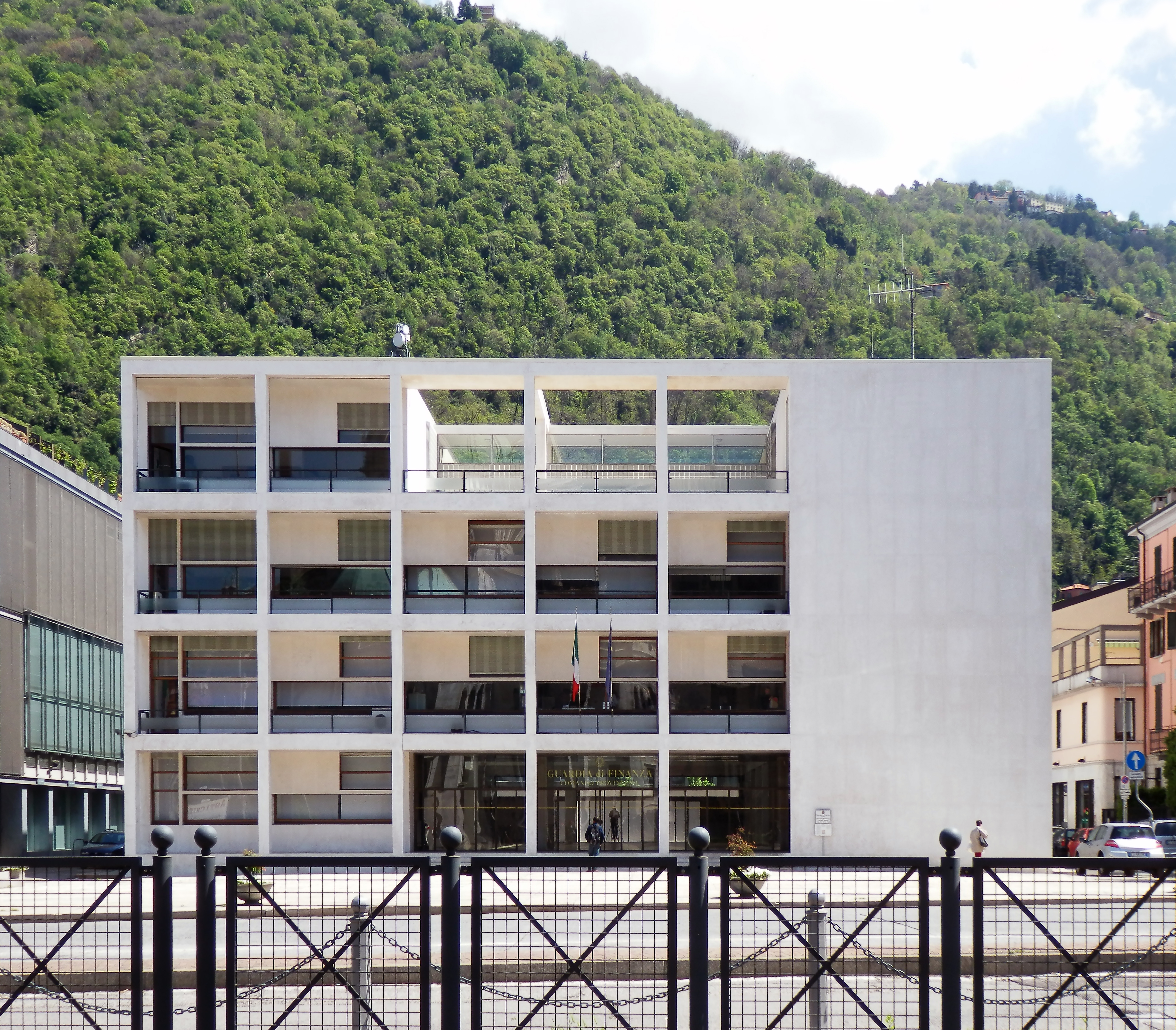 Casa del Fascio This is a photo of a monument which is part of cultural heritage of Italy.